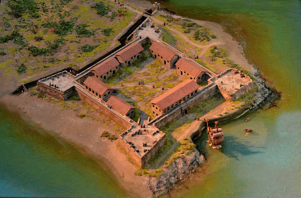 中文（台灣）: 西班牙人和平島聖薩爾瓦多城模型